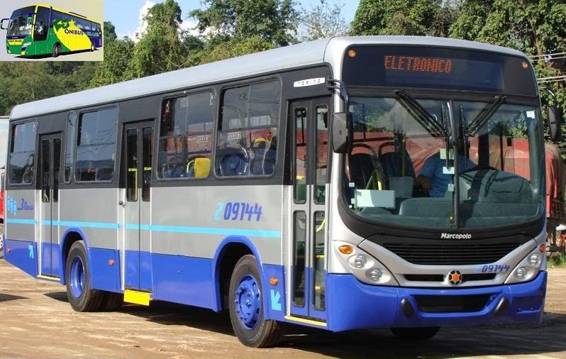 Torino G7 (o modelo mais recente) Três Marias em Duque de Caixas, Rio de Janeiro